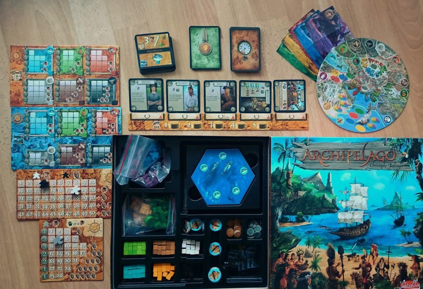 matériel Archipelago